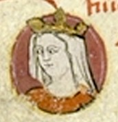 Margaret of France (1318)